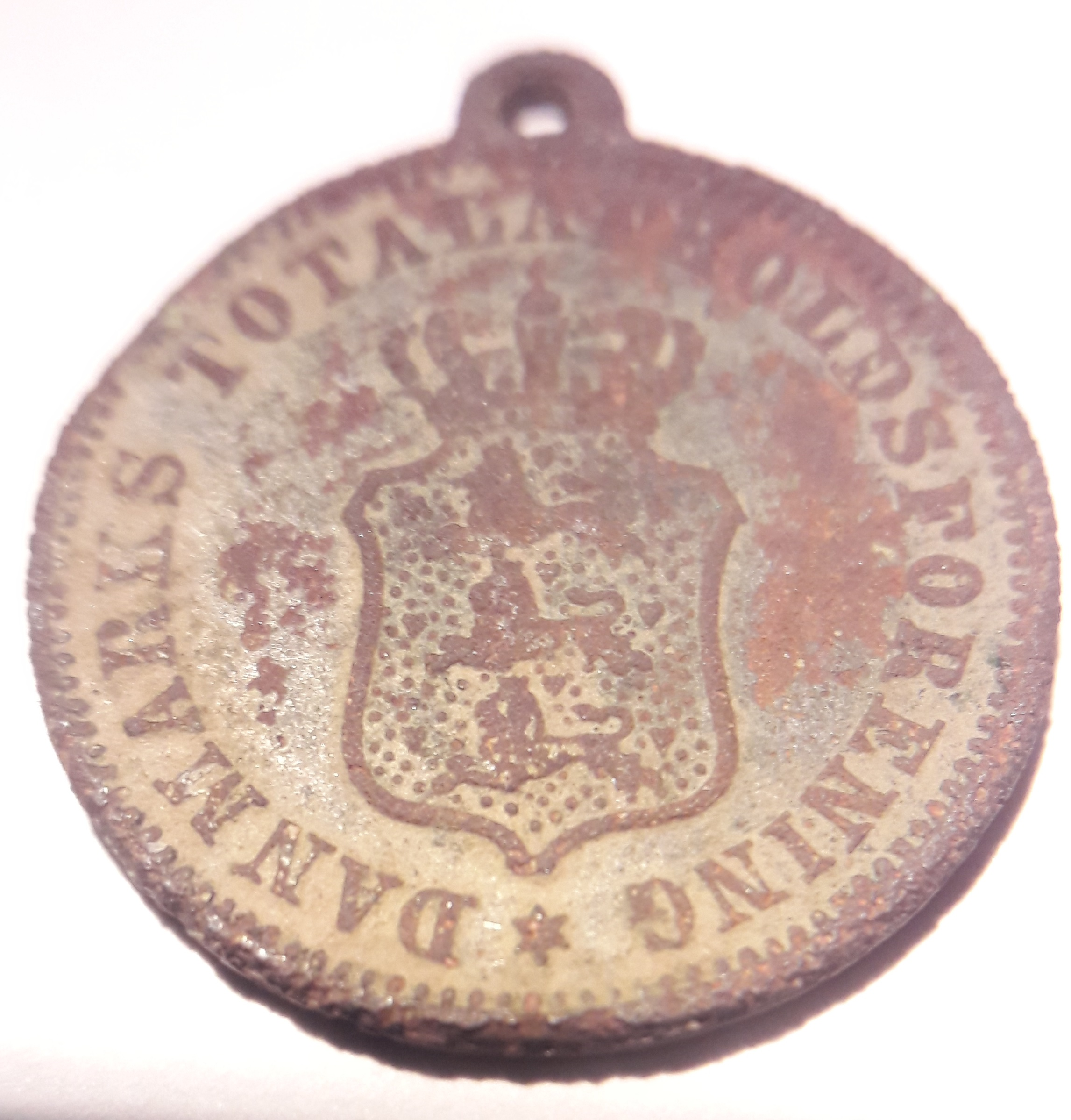 Mønt med logo for Afholdsbevægelsen.